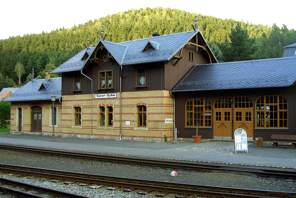 Bahnhof Oybin